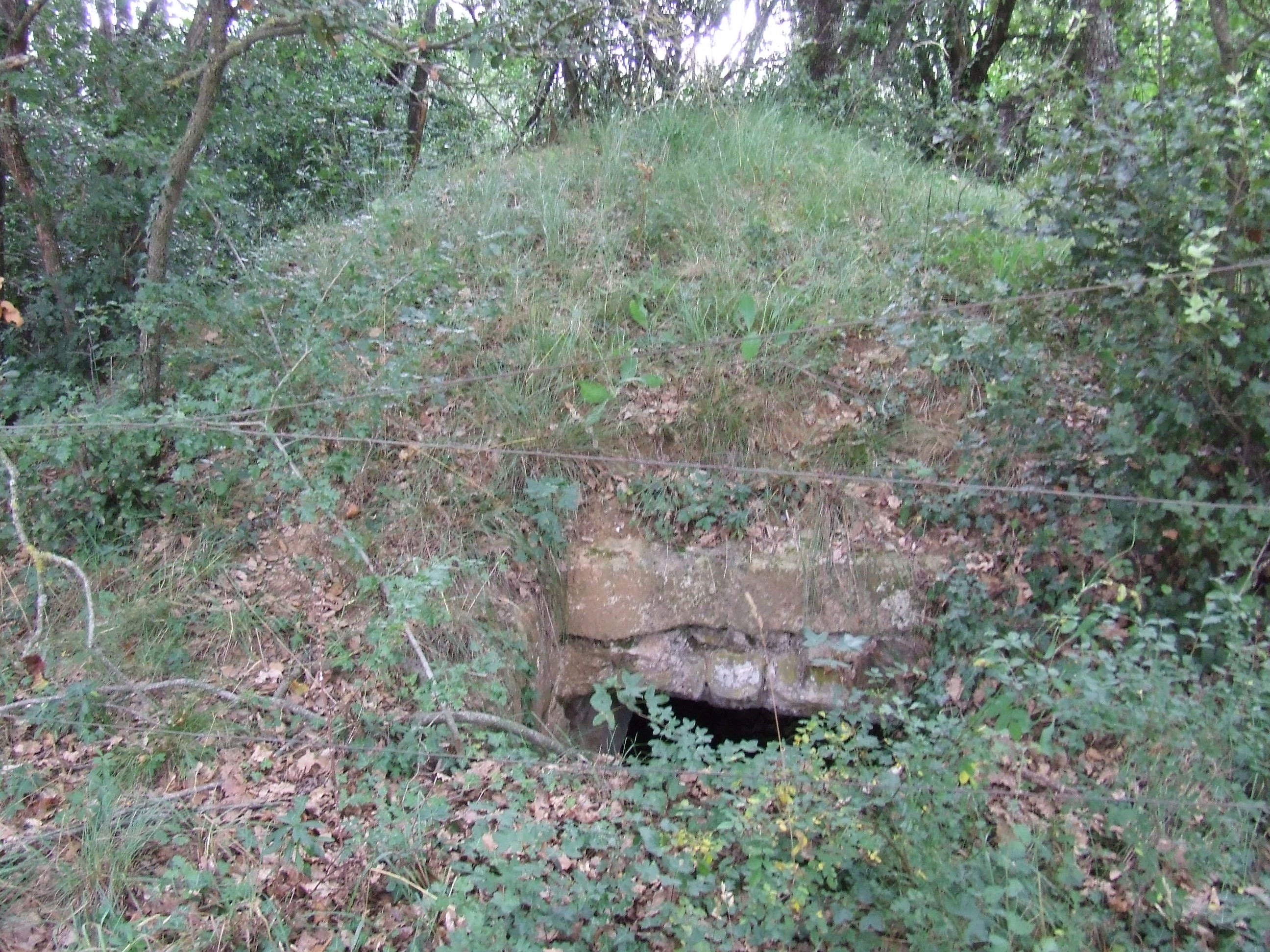 La Poua de Ca l'Antoja (Castellcir, Moianès)